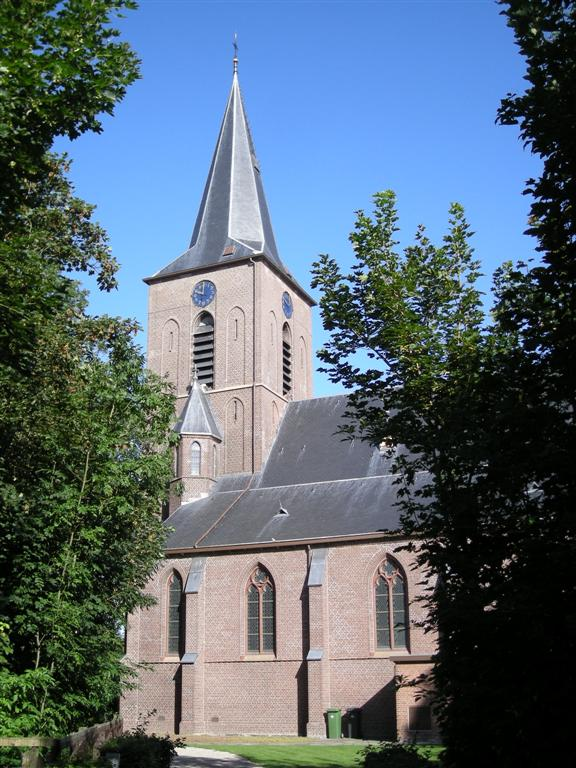 Sint Odulphuskerk van Bakhuizen. Church Bakhuizen